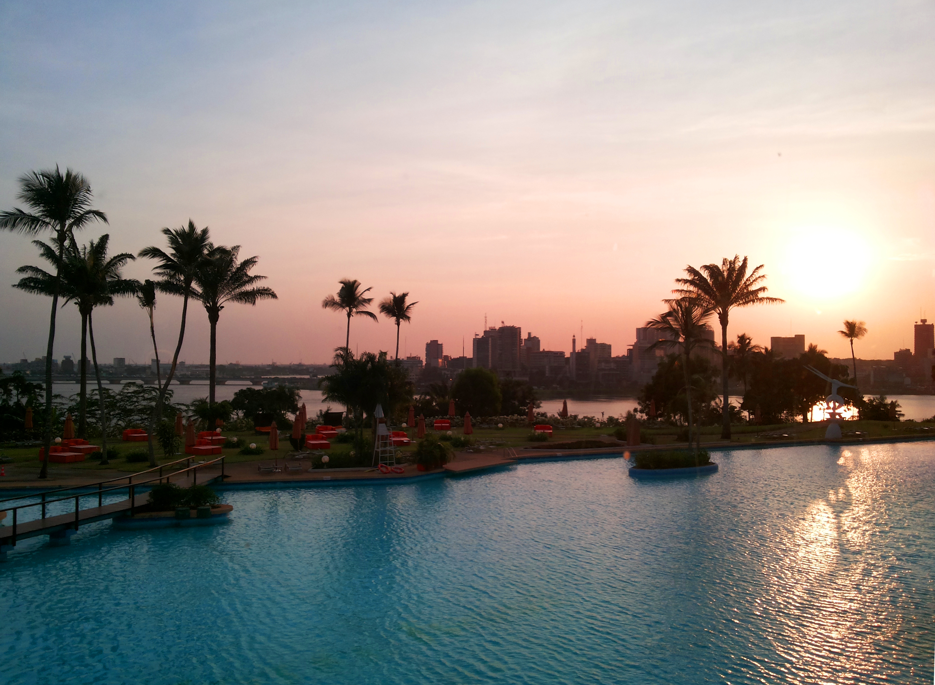 Prise ee vue depuis un hotel situé à Cocody.